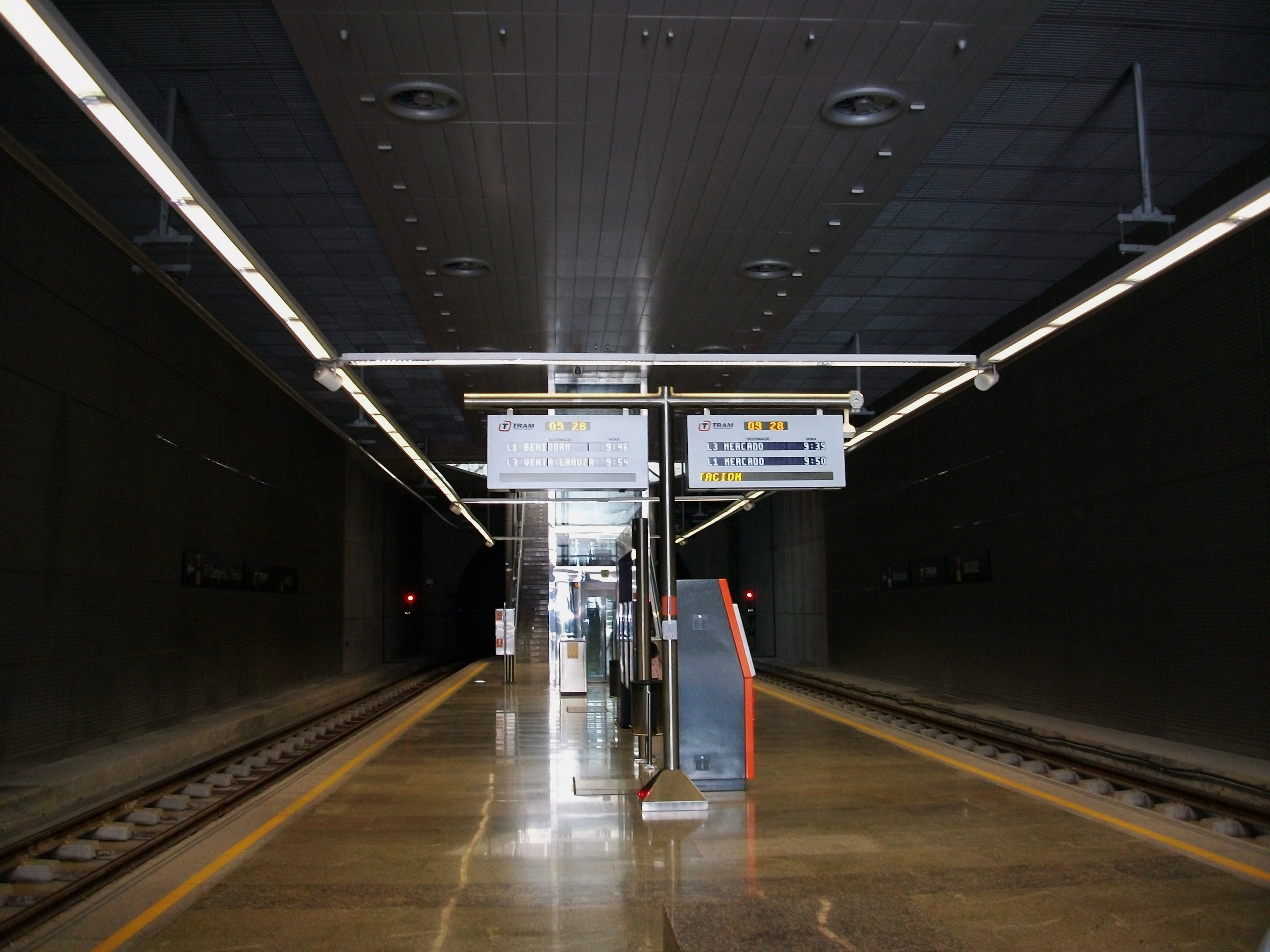 Estació del MARQ del TRAM, Alacant.